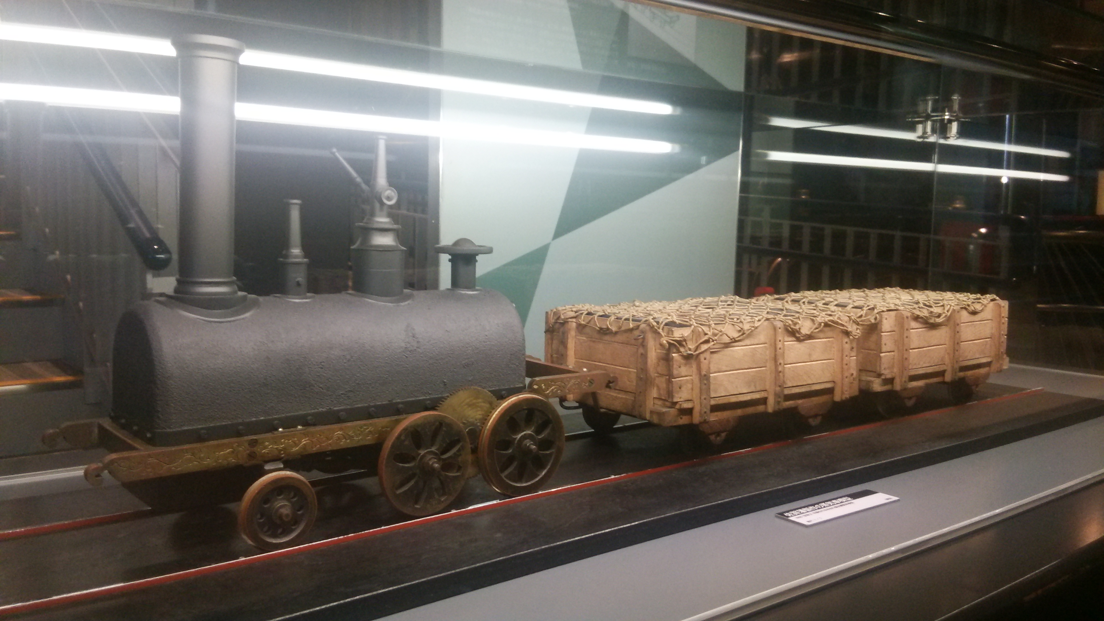 幕末期、佐賀藩によって製作された蒸気機関車の模型(複製)。さいたま市・鉄道博物館にて